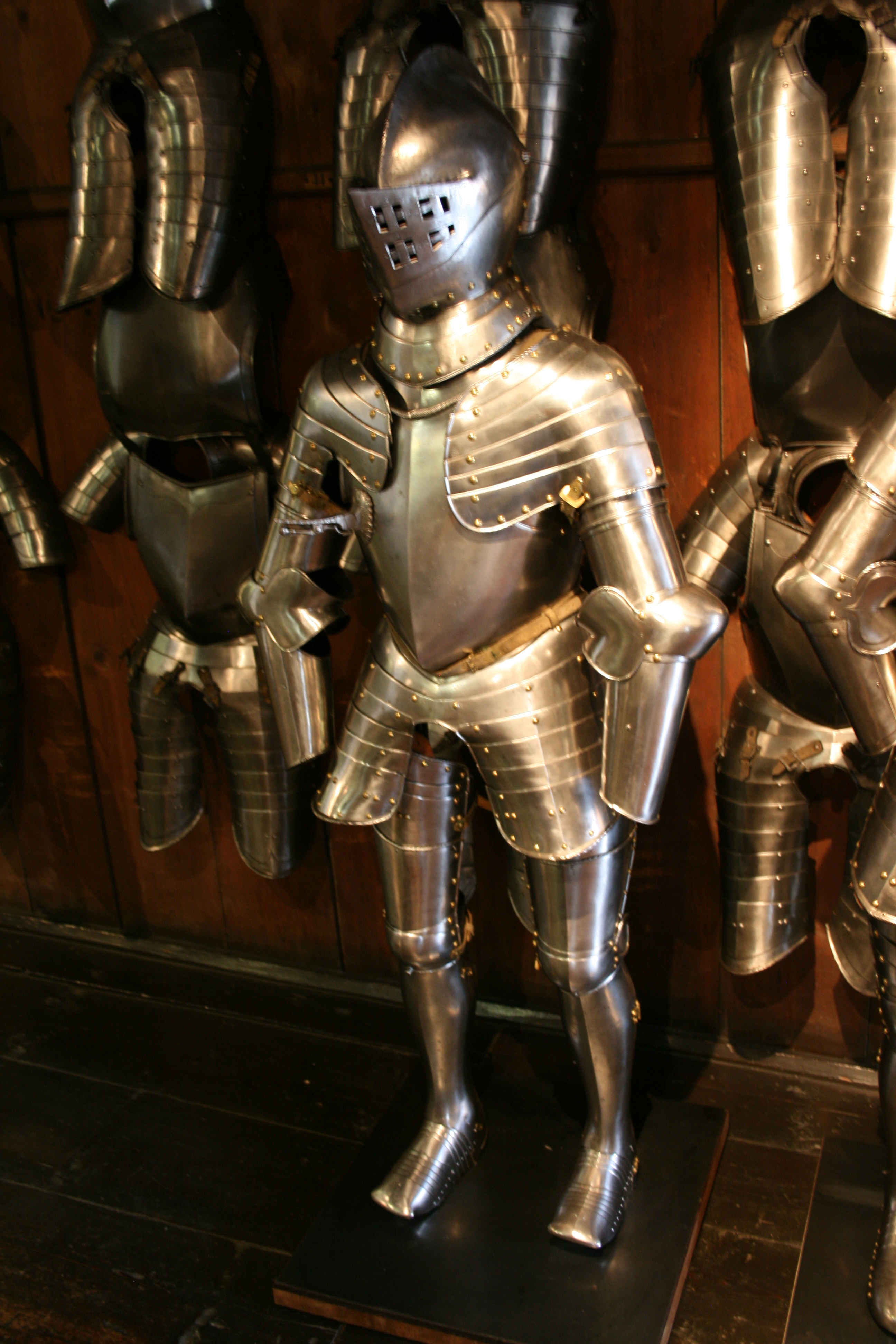 Küriss von Erzherzog Karl II. von Innerösterreich im Landeszeughaus in Graz.